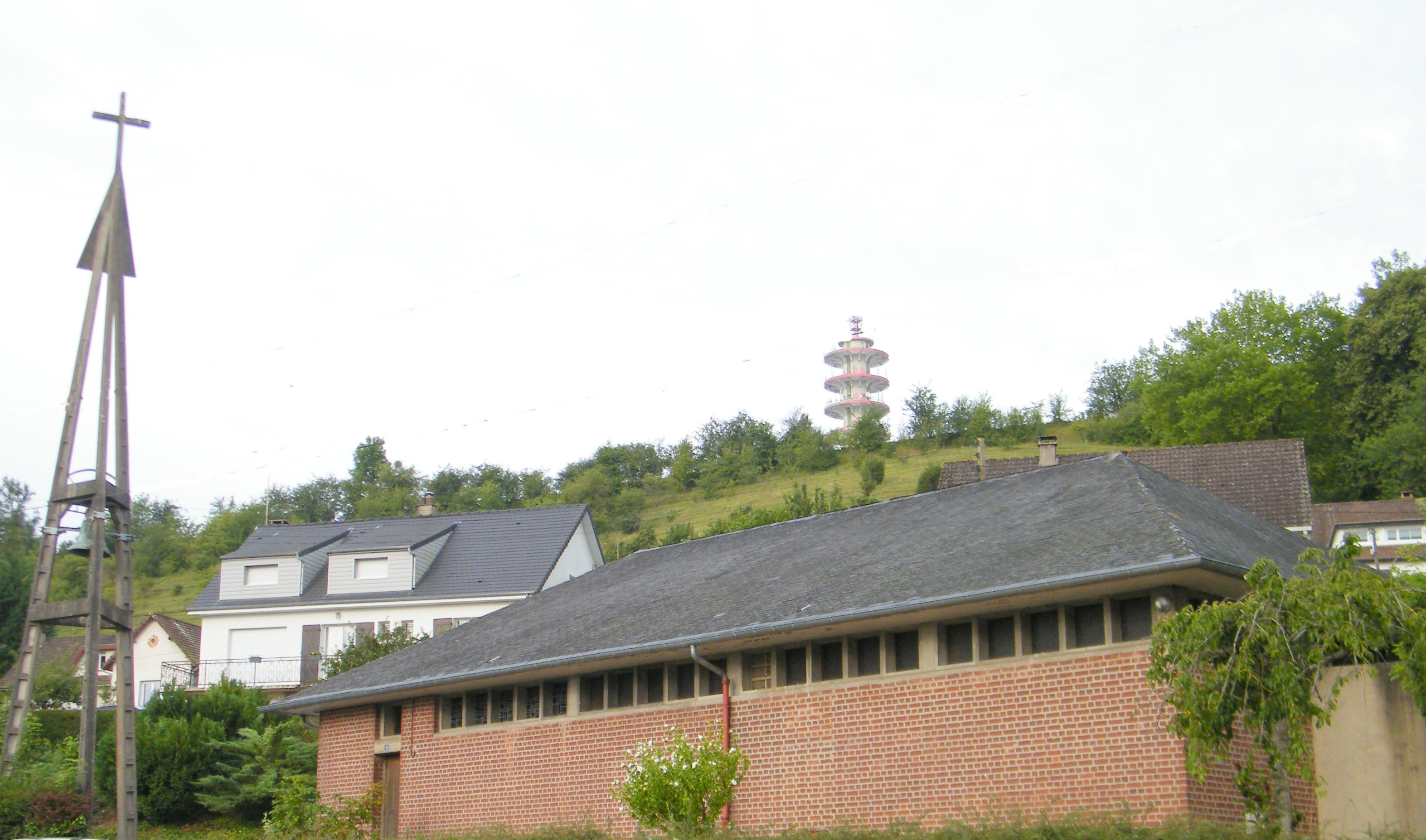 Église moderne Saint-Jean à Caubert, Mareuil-Caubert, Somme, France